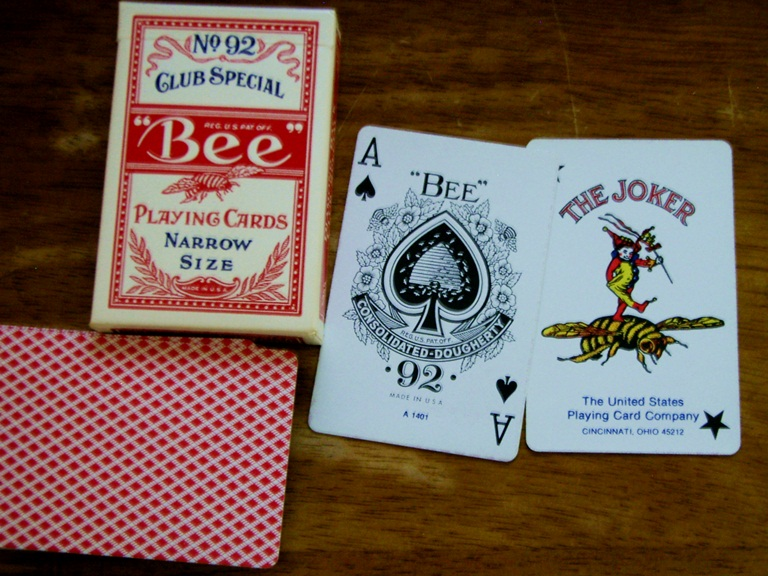 USPCのBEE（ブリッジサイズ） 現在販売されていない古いモデル